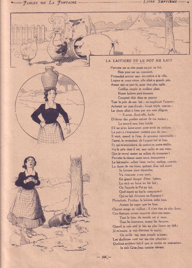 La Fontaine, La laitière et le pot au lait, illustration Benjamin Rabier, 1909. Scan d'un album de famille.